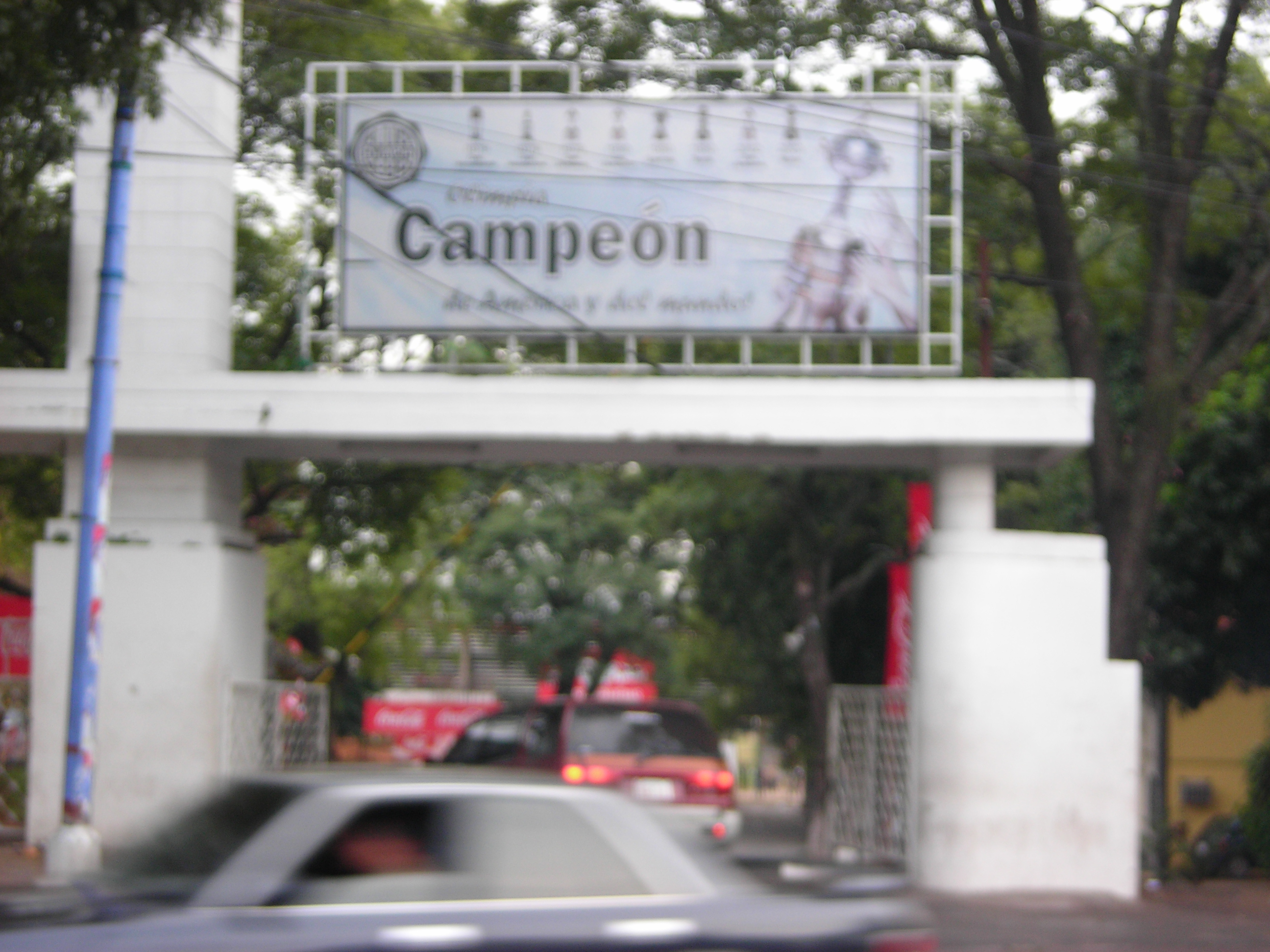 olimpia